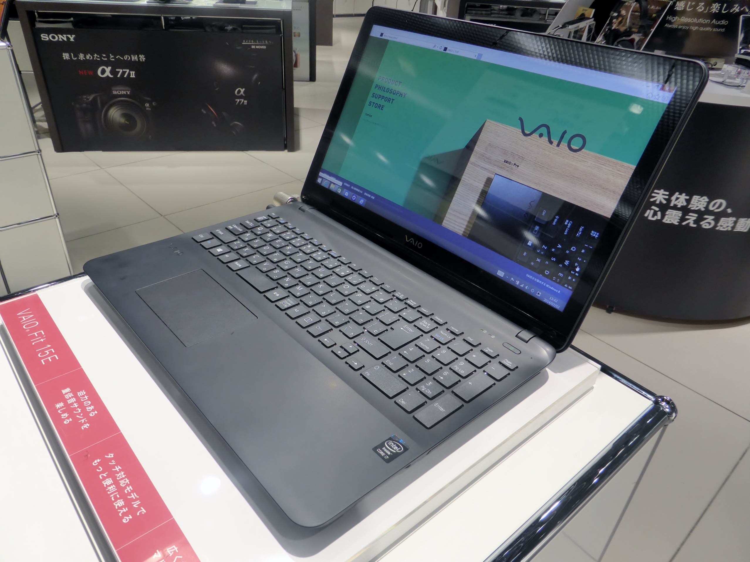 VAIO株式会社設立後初のモデルFit 15Eを撮影。